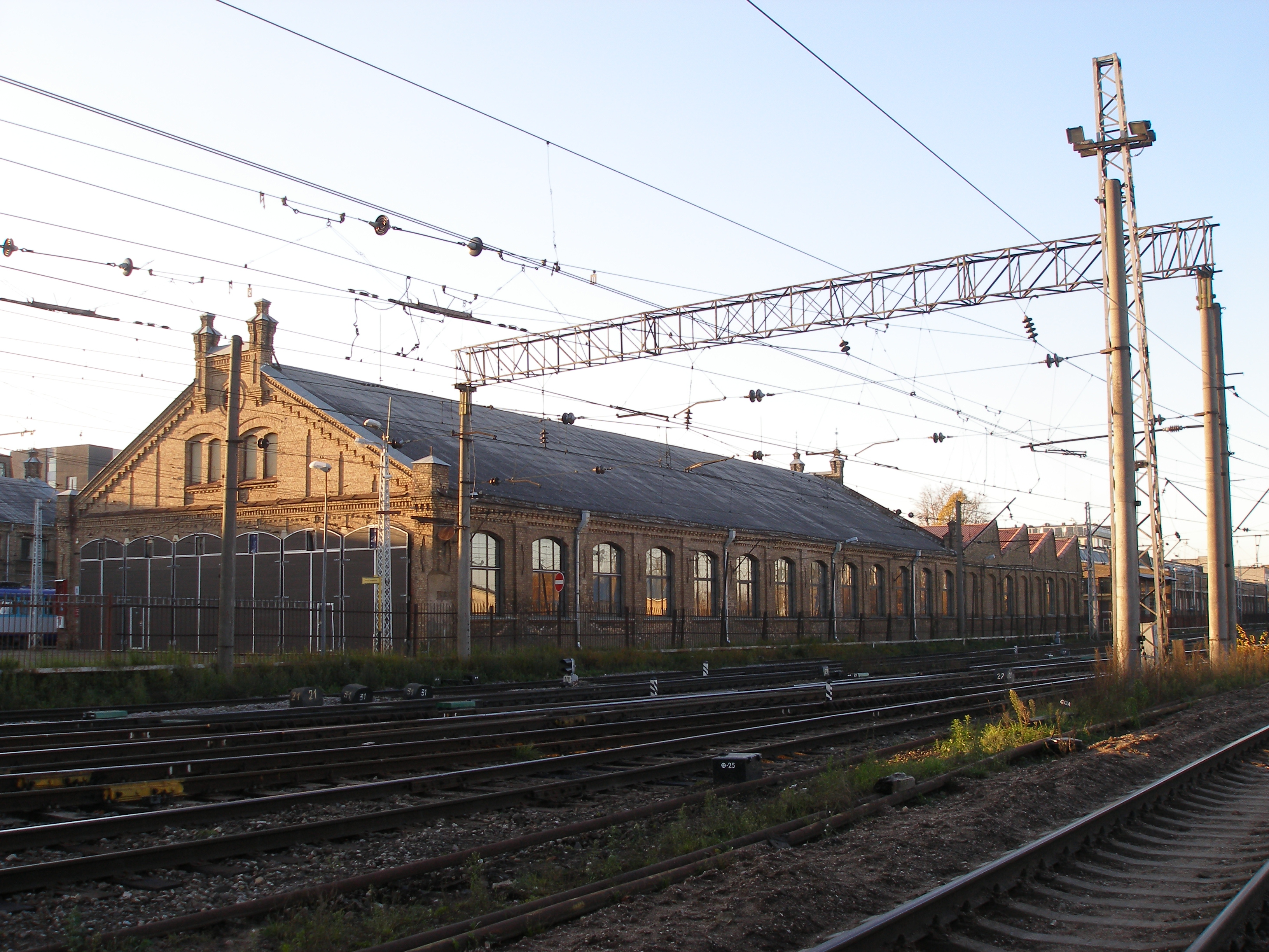 5. tramvaju depo Brīvības ielā. Fotografējis Jānis Vilniņš (scAvenger) 2009. gada 31. oktobrī.